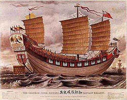 Chinese Junk Keying. 1848 engraving.